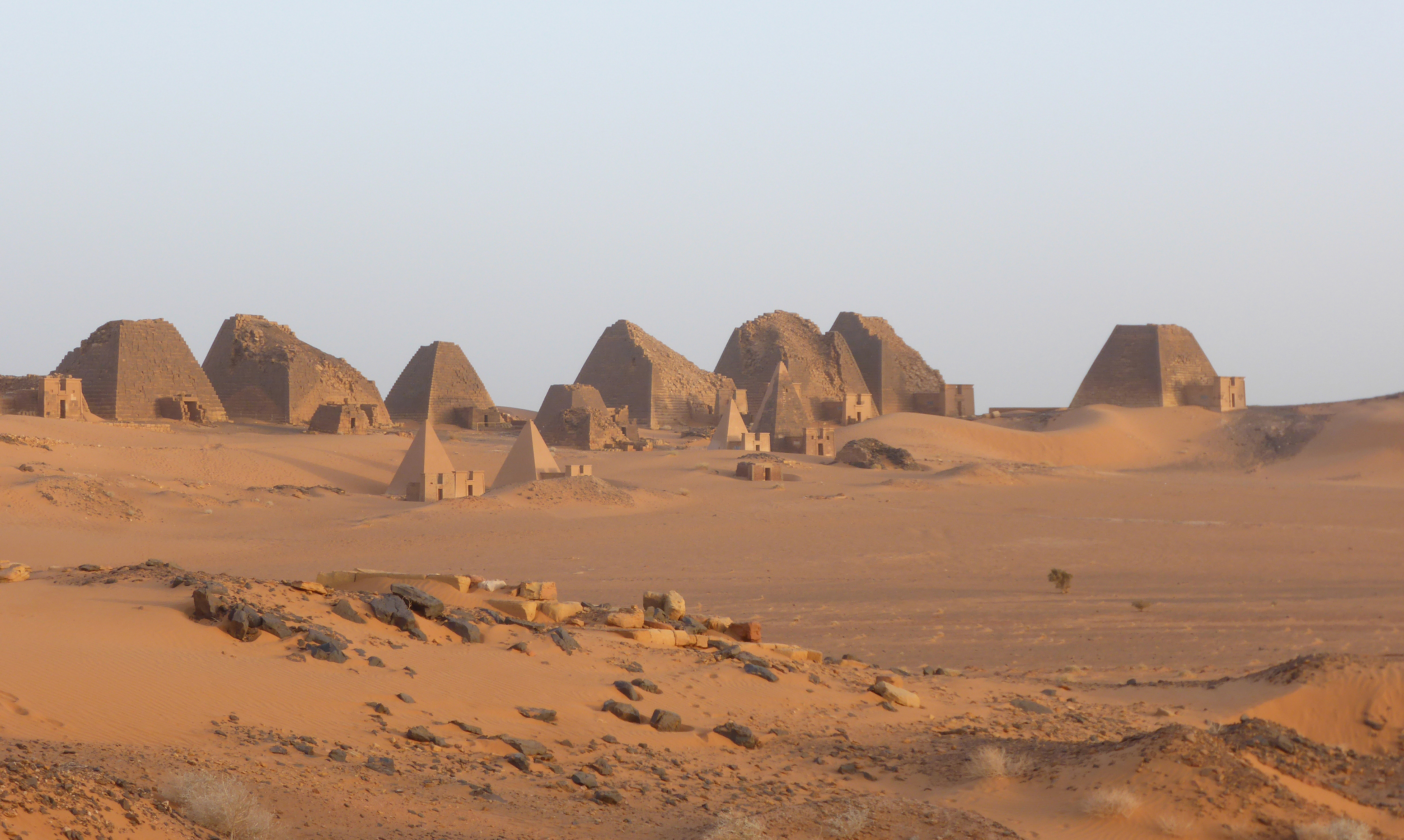 Meröe Pyramids at sunset (4)